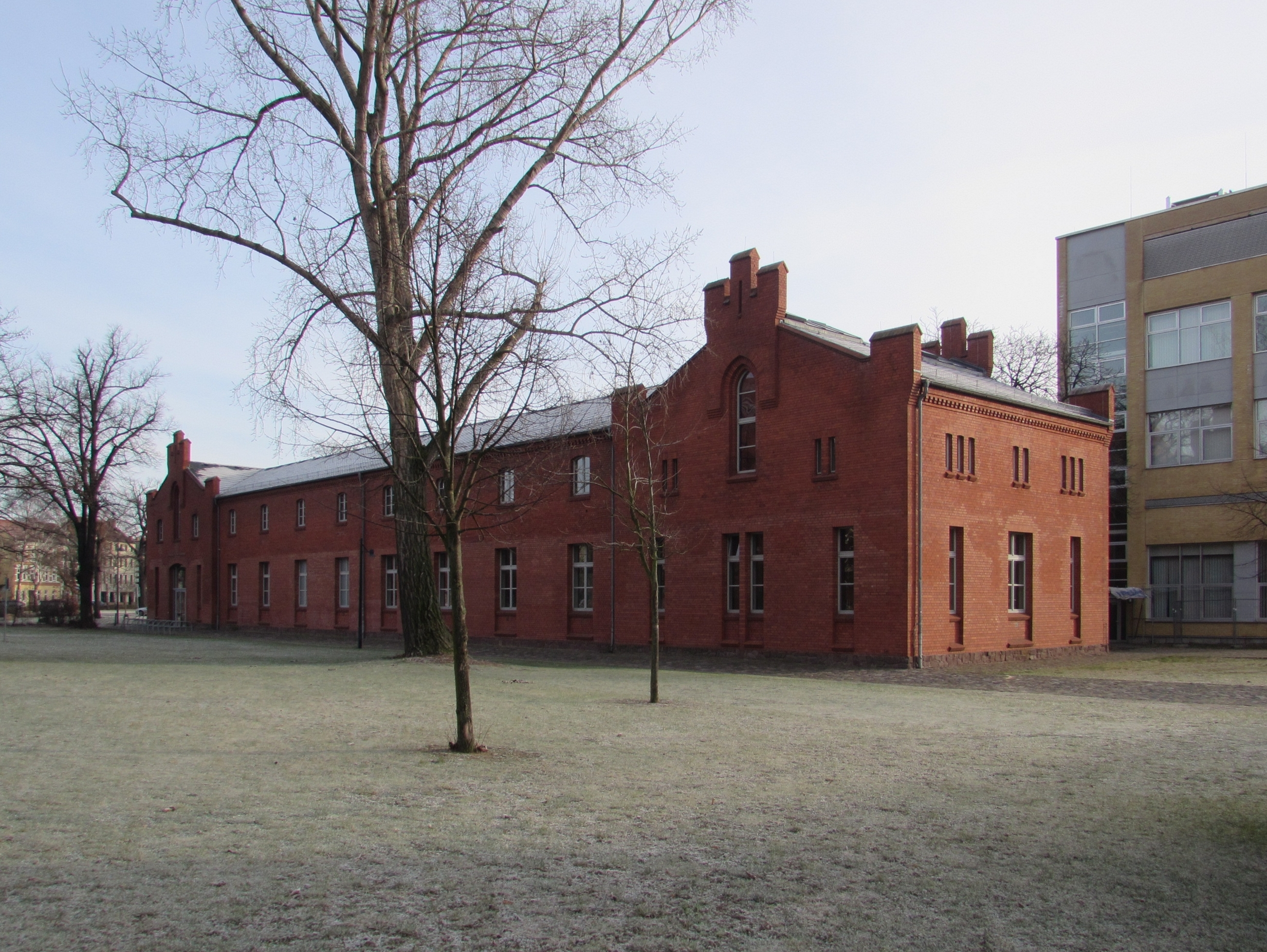 reitstall der fh brandenburg